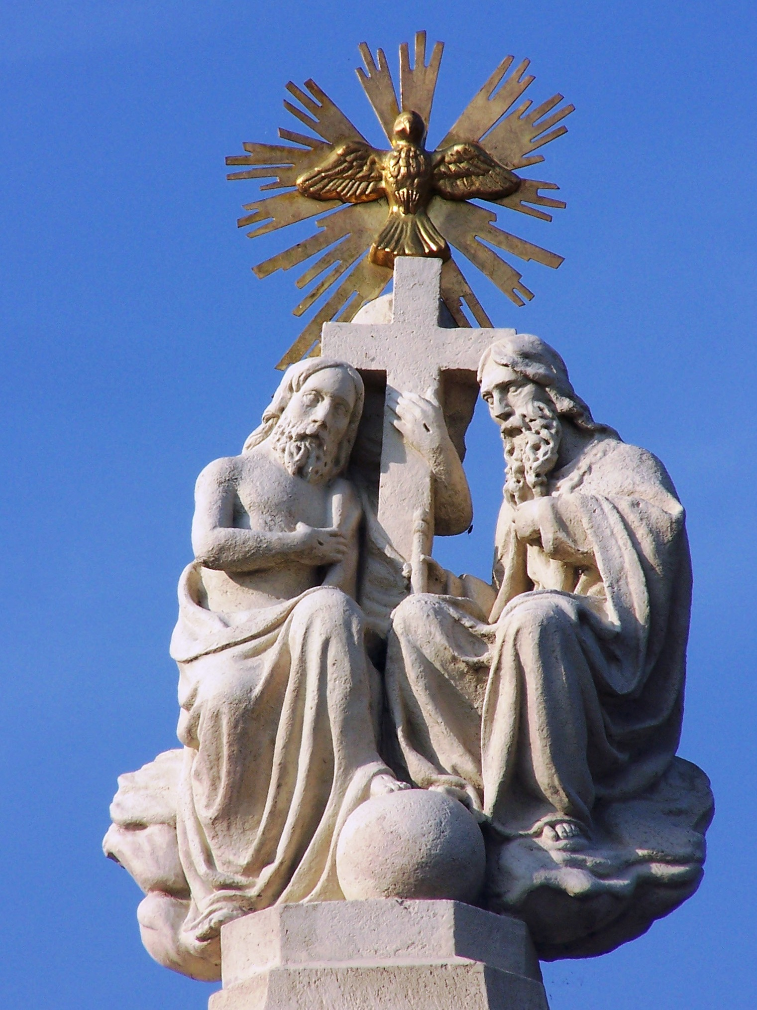 Szentháromság-oszlop (Biatorbágy, Bia, Vörös Hadsereg útja) This is a photo of a monument in Hungary, Identifier: 6910